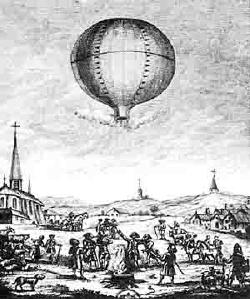 Первый полёт монгольфьера 5 июня 1783 года Гравюра